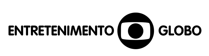 Logotipo actual de la División de Entretenimiento de la Globo, desde Abril de 2013.